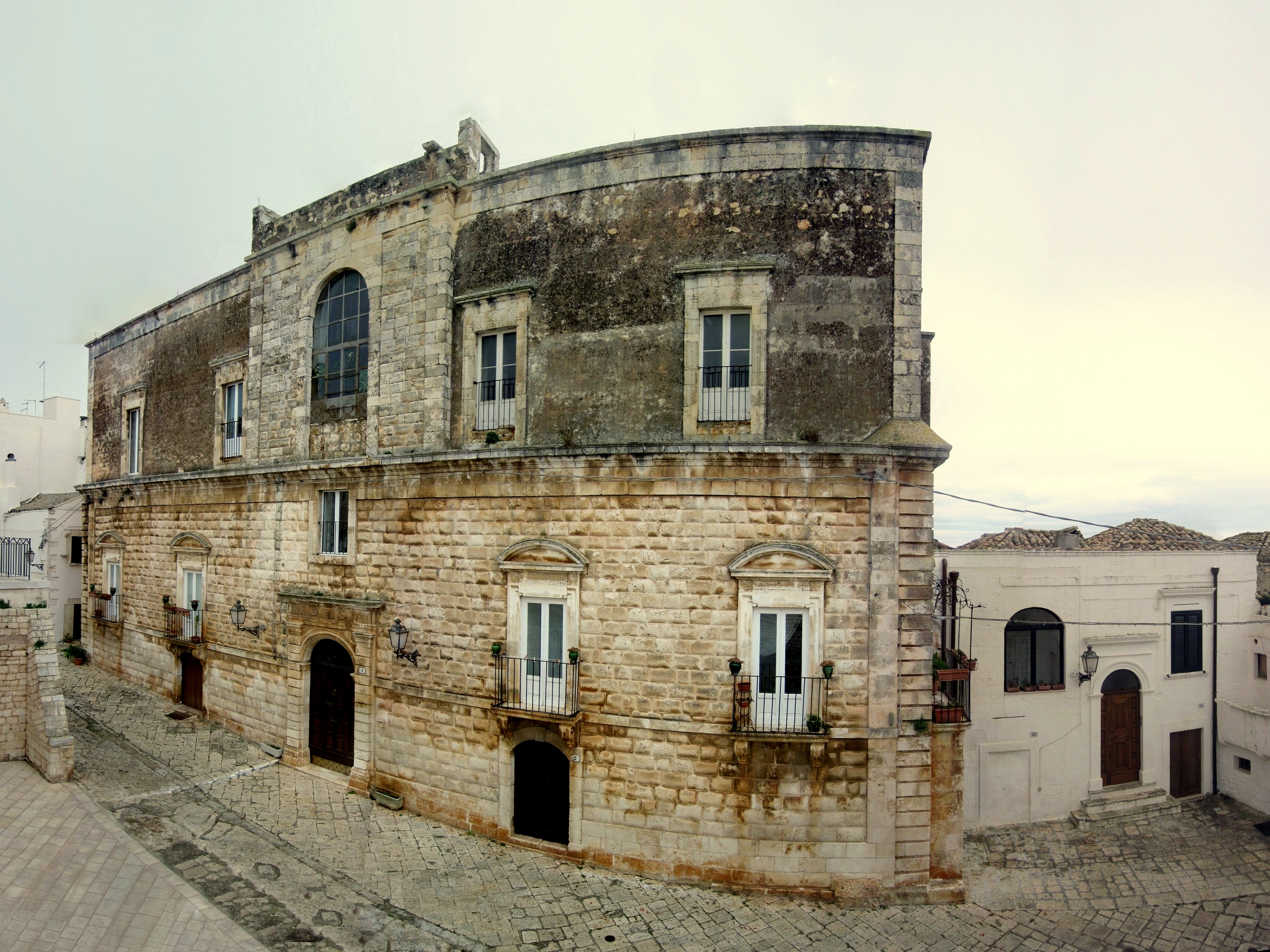 Palazzo ottocentesco di Ceglie Messapica. Costruito nel 1801 dall'architetto Salvatore Trinchera. Il pianterreno rimanda ai moduli del convesso bugnato fiorentino. Le bugne, in pietra forte hanno assunto con il tempo il colore ambra, La facciata risulta incompleta.